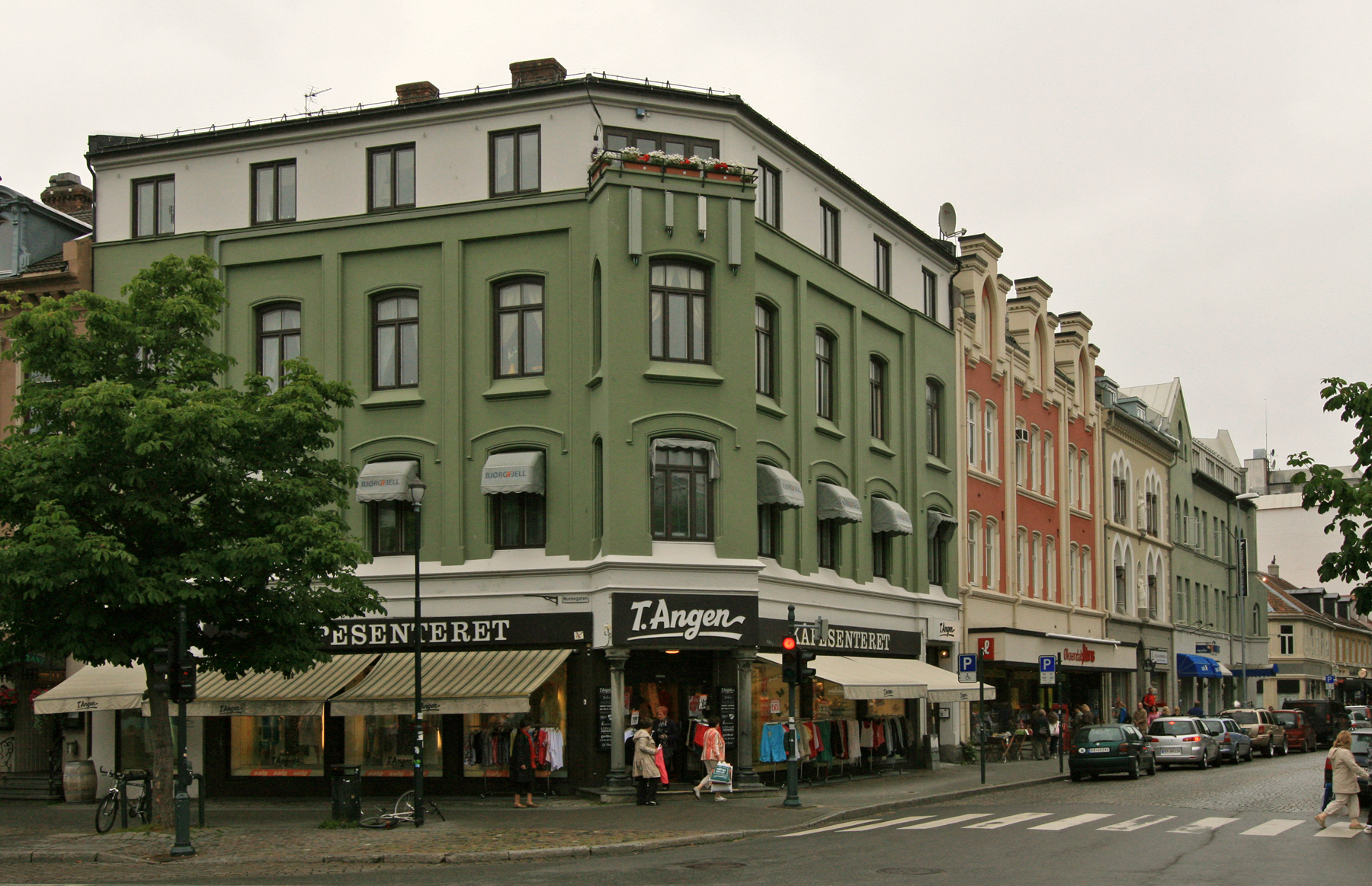 Det nygotiske kvartalet, Dronningens gate 26-32, Trondheim. Sett fra Munkegata.